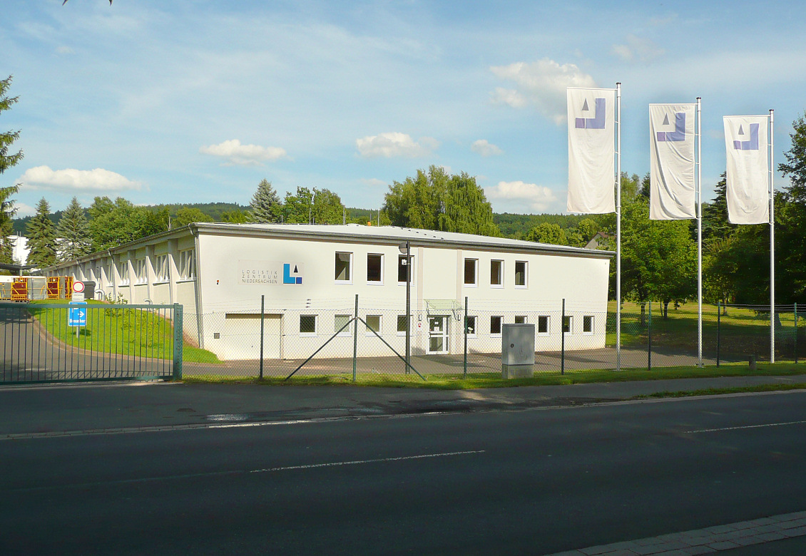 Logistikzentrum Niedersachsen in Hann. Münden